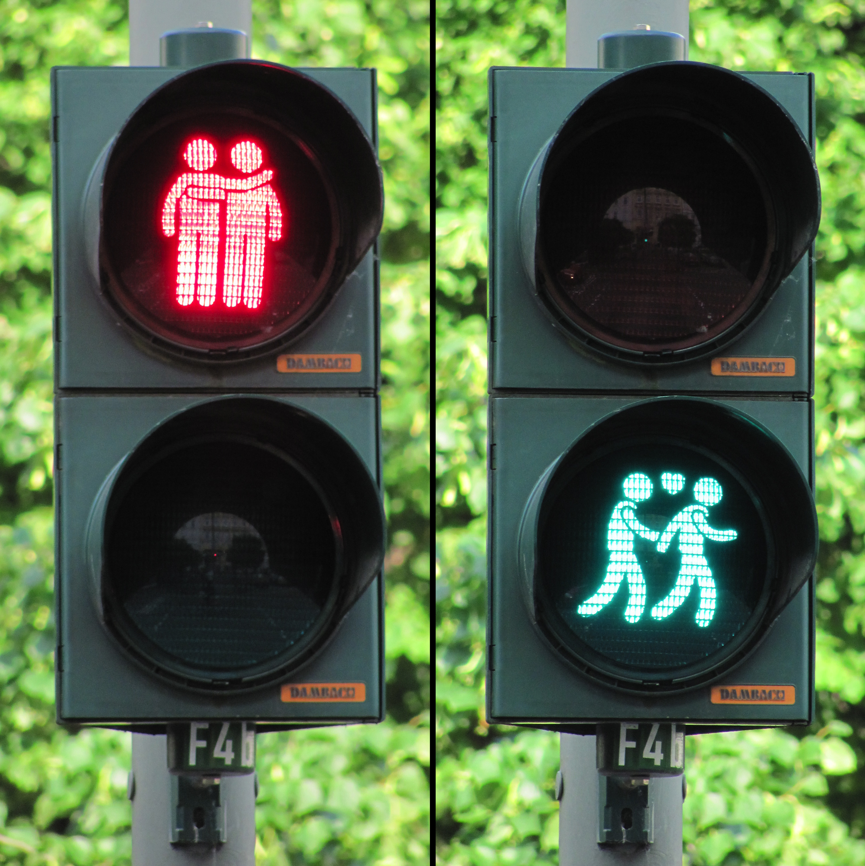 Männerversion der „Vielfaltampel“ („Homoampel“) an der Kreuzung Kirchenallee/Lange Reihe in Hamburg-St. Georg